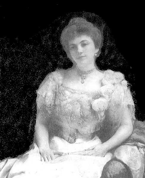 Cyprienne Dubernet, Mme Hériot domaine public